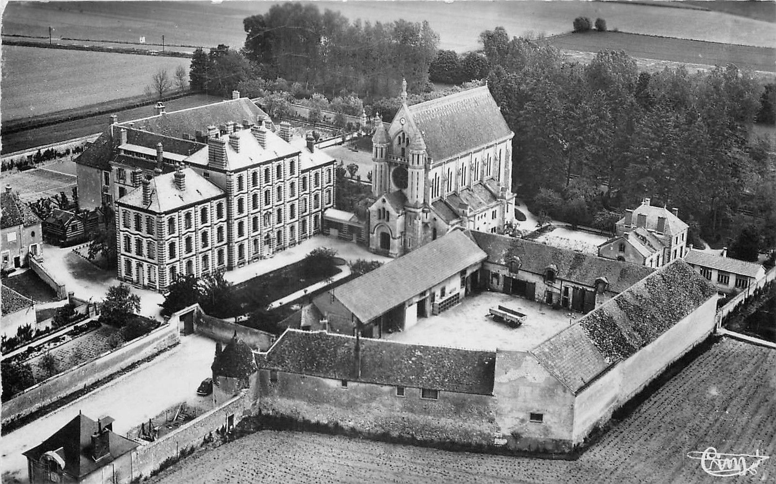 Abbaye Sainte-Colombe de Sens.